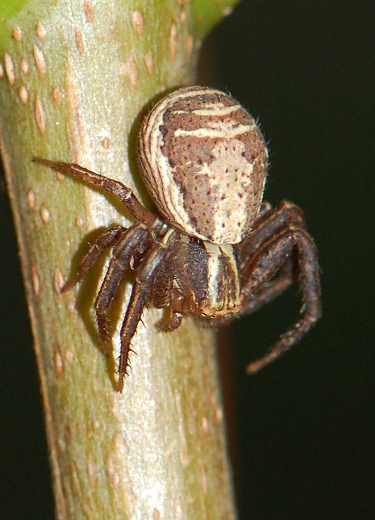 Xysticus ulmi, Weibchen, Berlin-Pankow. Bestimmung genitalmorphologisch durch K.-H. Kielhorn, Berlin